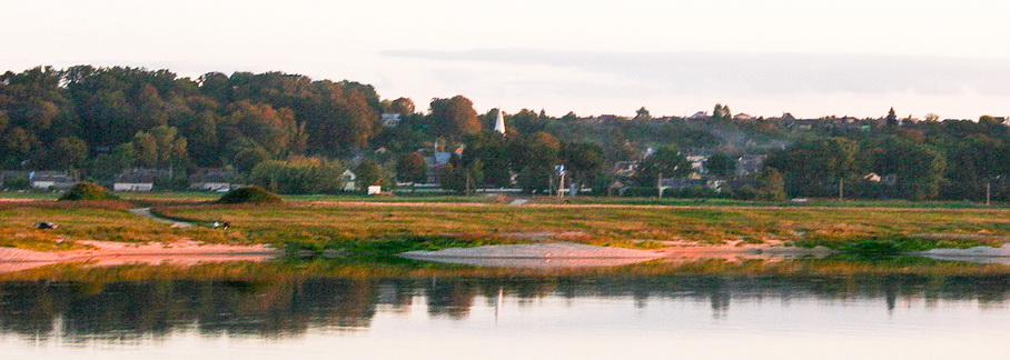 Gelgaudiškis, Lithuania